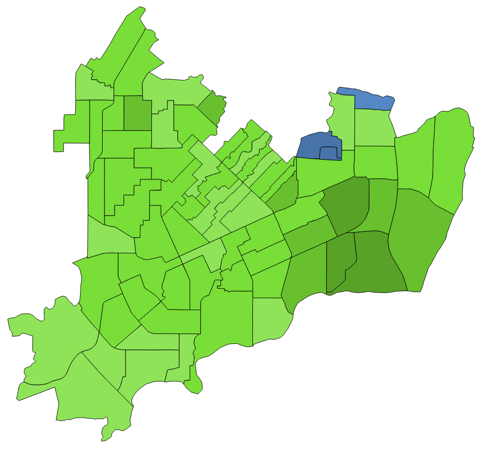 顏色對照表